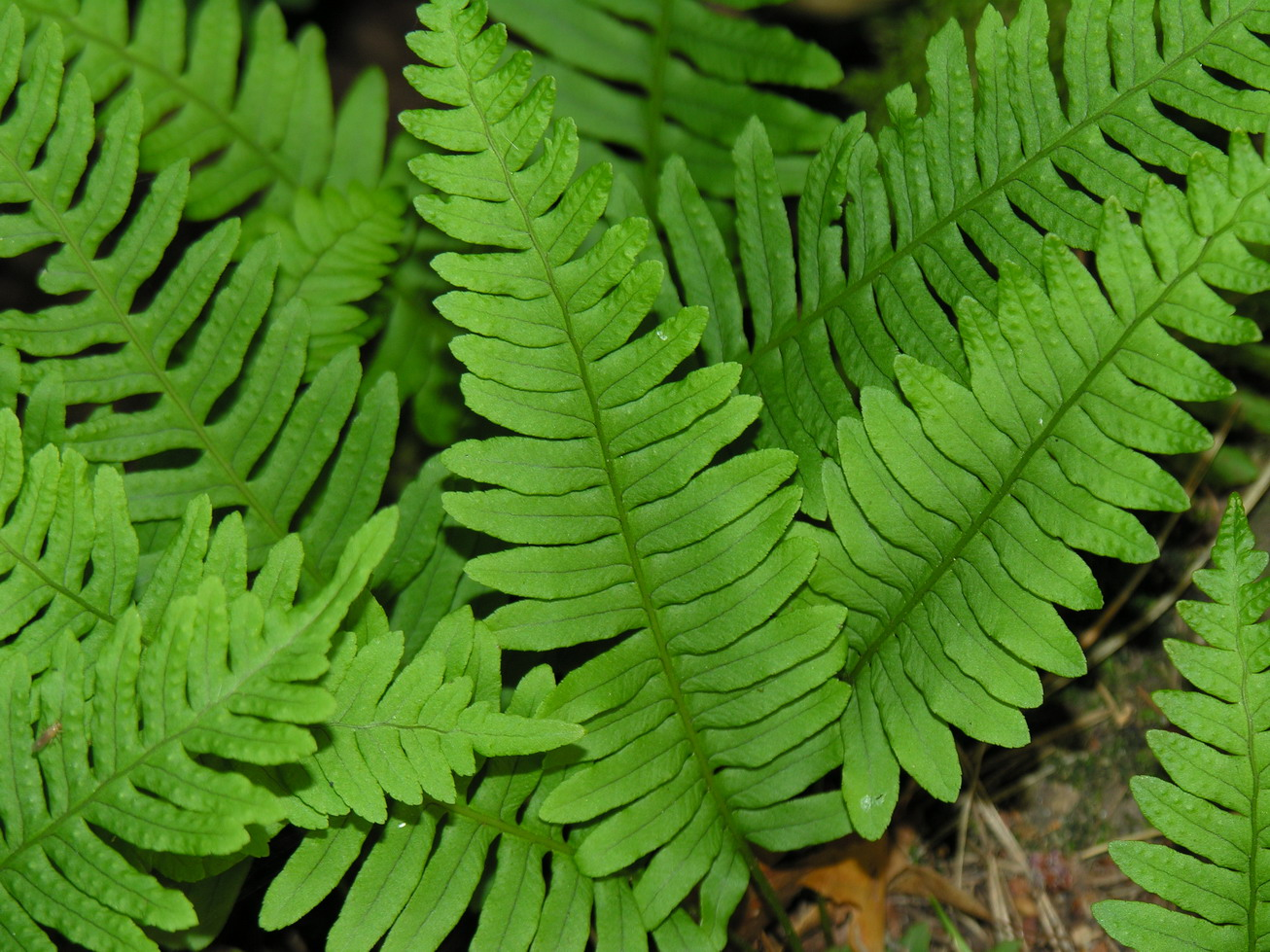 Paprastoji šertvė (Polypodium vulgare) Fam. Polypodiaceae Foto: Algirdas, 2005 m.